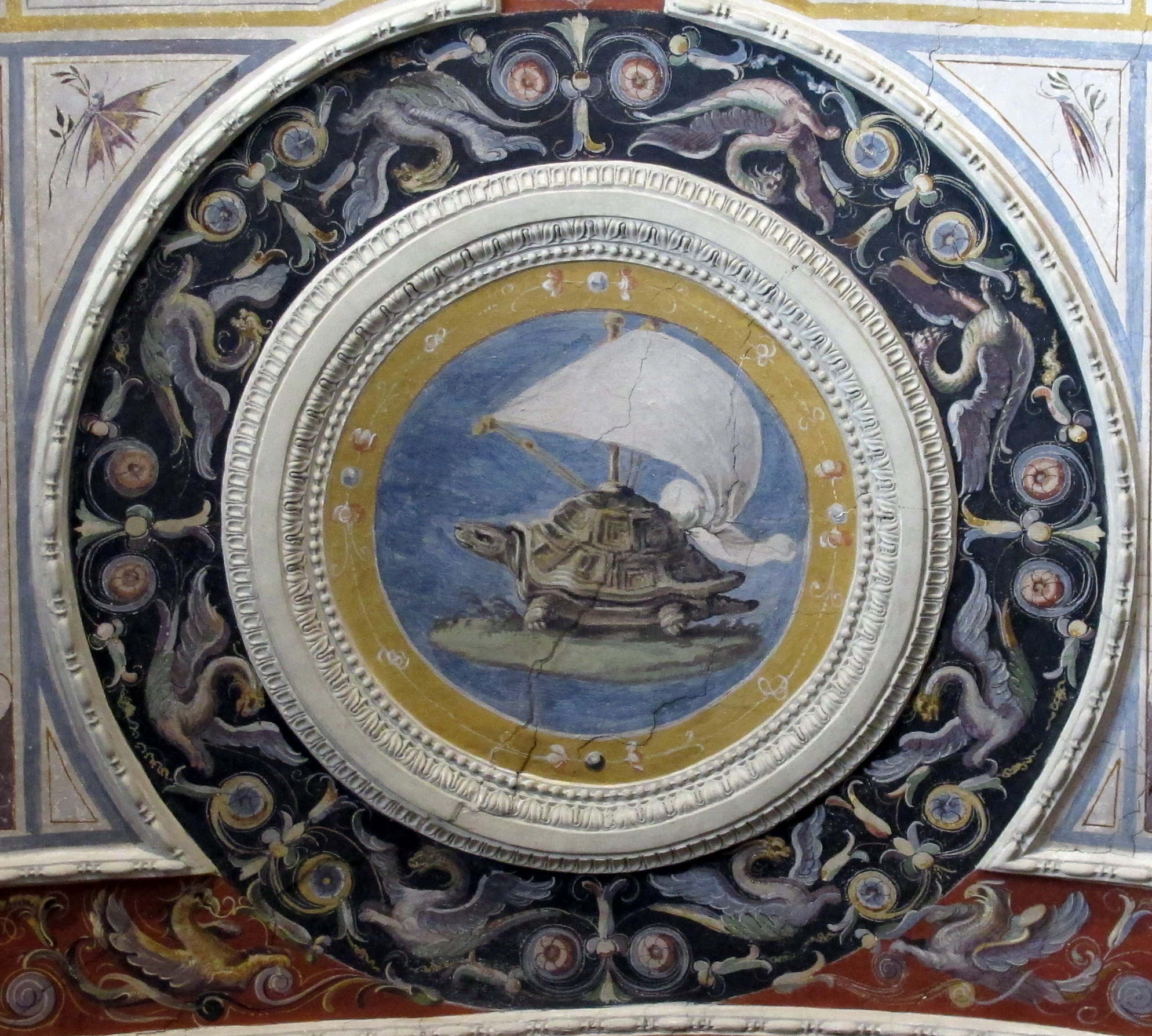 Palazzo Vecchio, Firenze